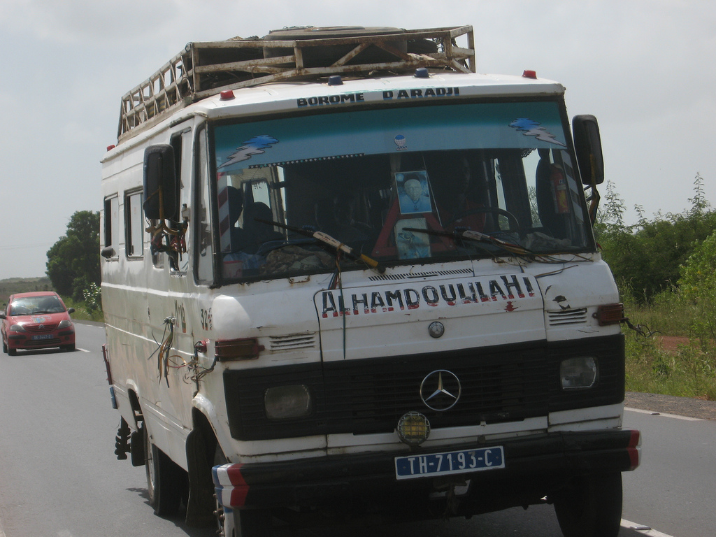 Car rapide blanc sénégalais (Mercedes-Benz) aux environs de Thiès.